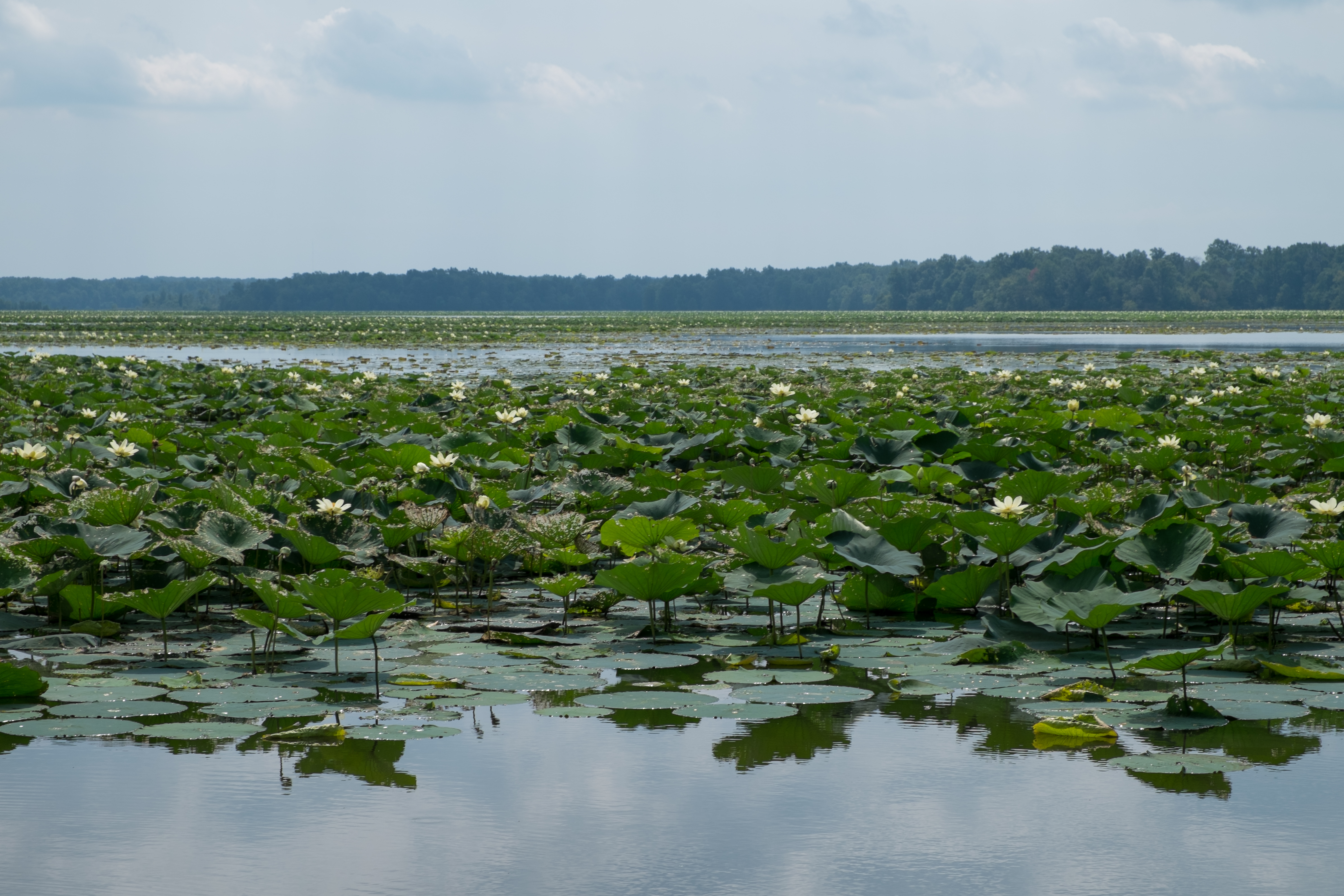 Crab Orchard Lake